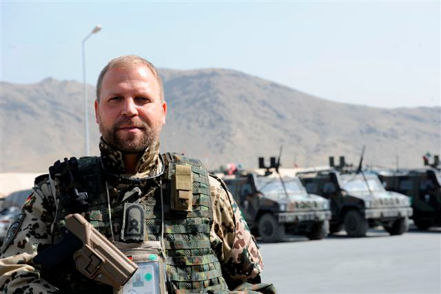 Der Gründer des Roten Freitags in Afghanistan